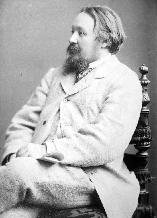 Konkoly-Thege Miklós (1842–1916) csillagász, meteorológus, fizikus portréja. Kozmata Ferenc fényképfelvétele (1890-es évek)